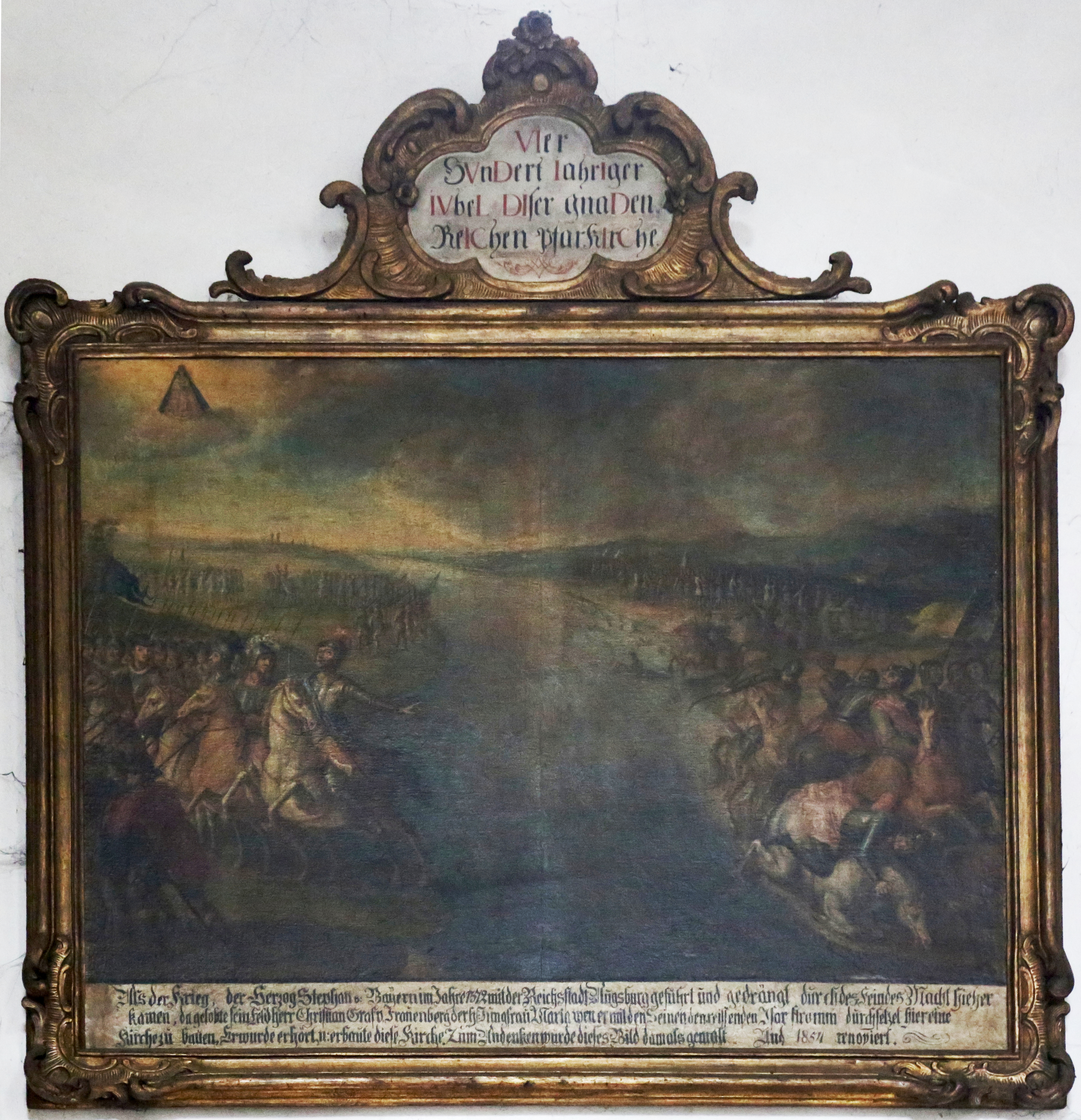 St. Maria Thalkirchen, Votivbild von 1772. Es zeigt das Gelübde der Grafen Wilhelm und Christian von Fraunberg zu Haag, die bisherige kleine Kirche auszubauen, als sie im Jahr 1432 durch die Muttergottes in den Isarauen vor Verfolgern gerettet wurden.